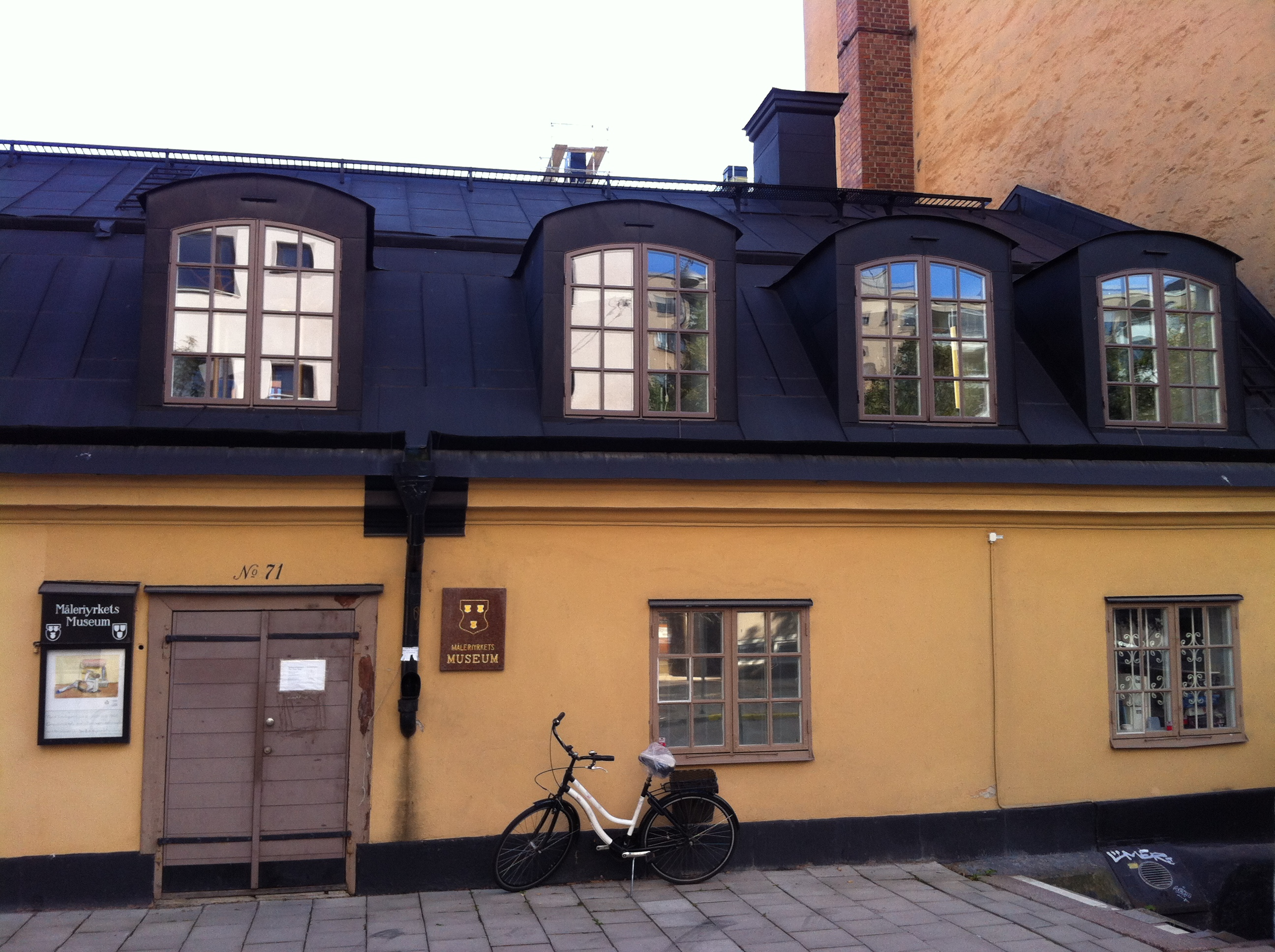 Målariyrkets museum, Brännkyrkogatan 71, Stockholm Museum of painting, Stockholm